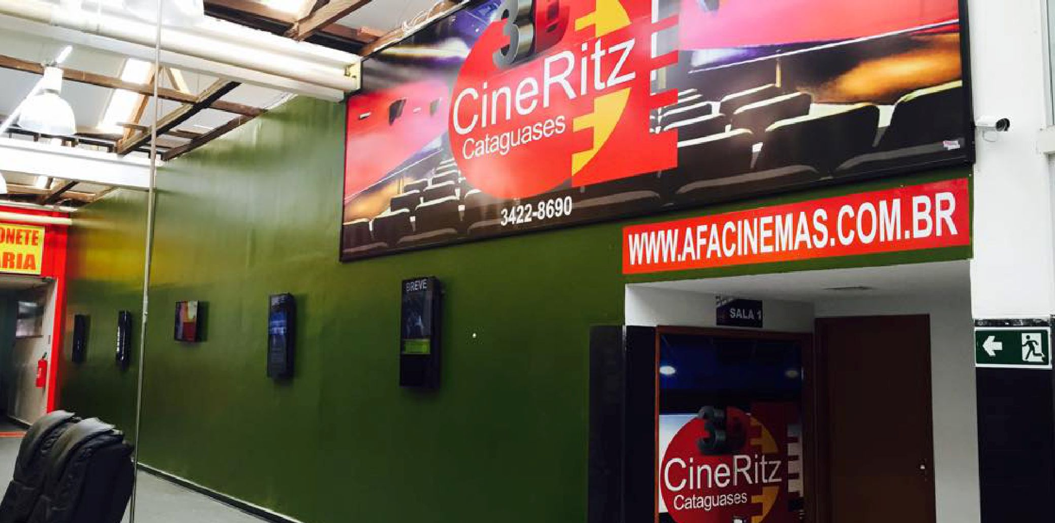 Área externa do Cine Ritz Cataguases